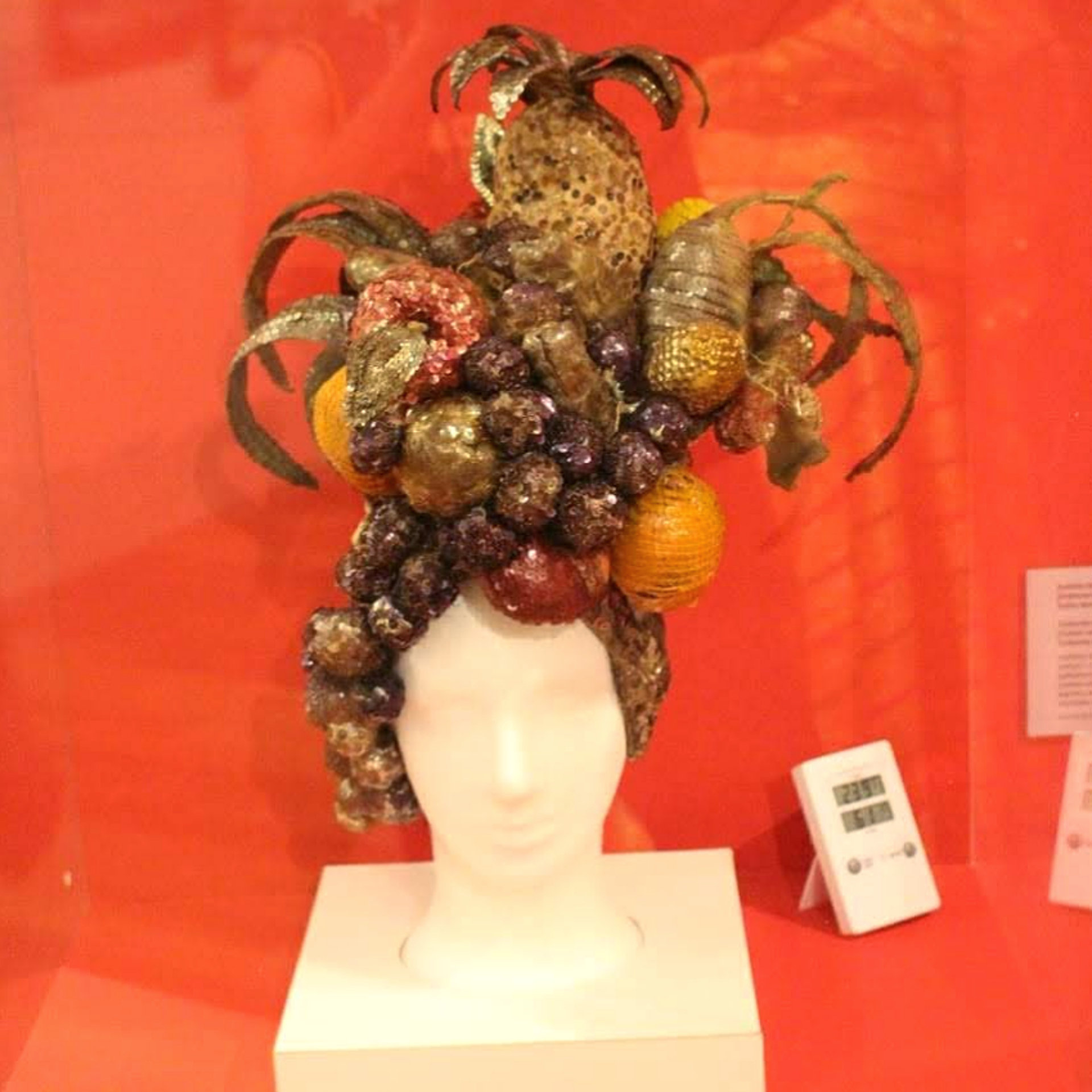 Turbante de Carmen Miranda, que fez parte do último traje de baiana criado pela cantora. A peça do acervo do Museu Carmen Miranda, no Rio.